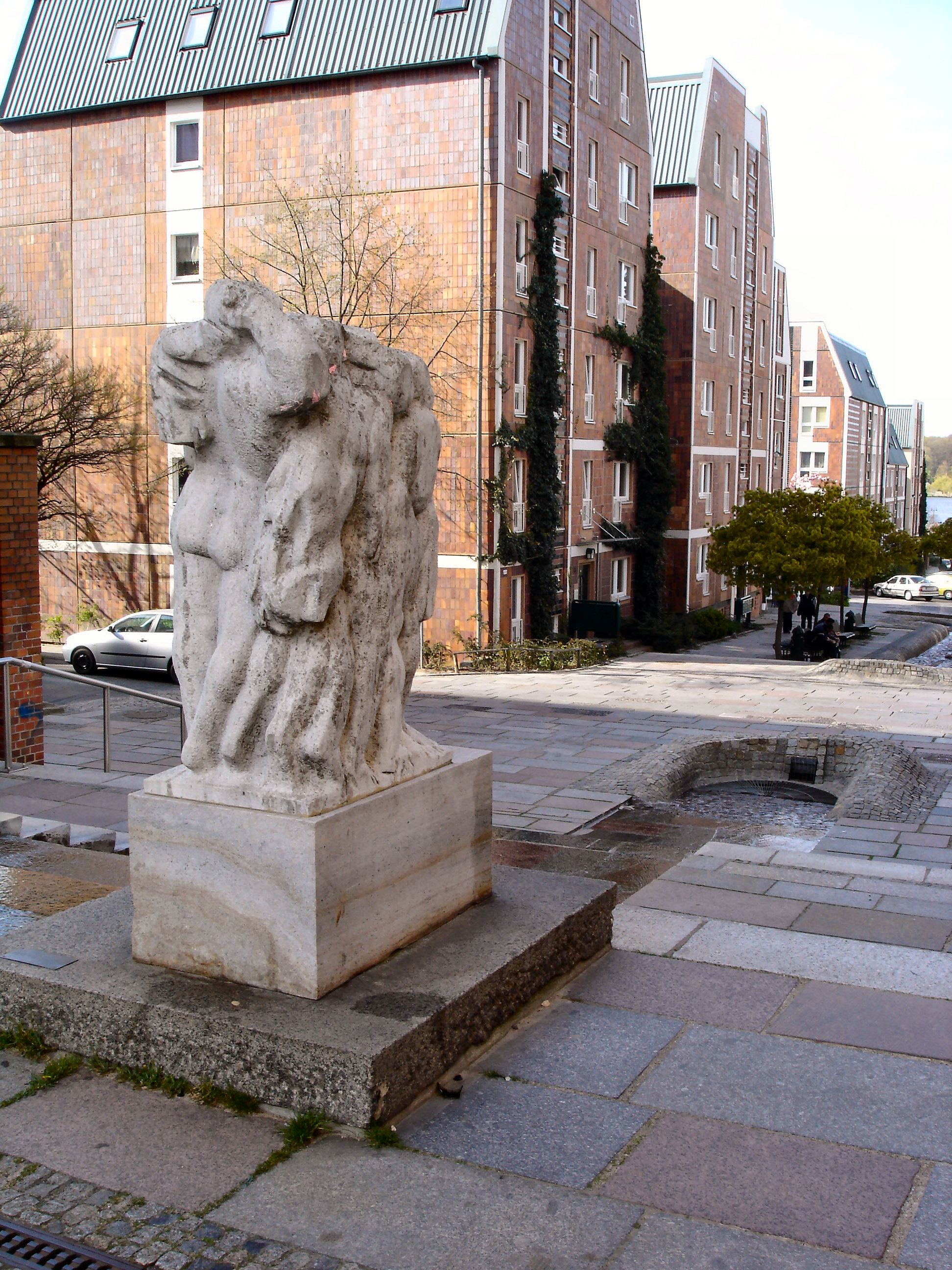 Brunnenanlage "Quelle, Wasser, Ufer" von Wolfgang Friedrich in Rostock / well system "Font, Water, Bank" of Wolfgang Friedrich in Rostock